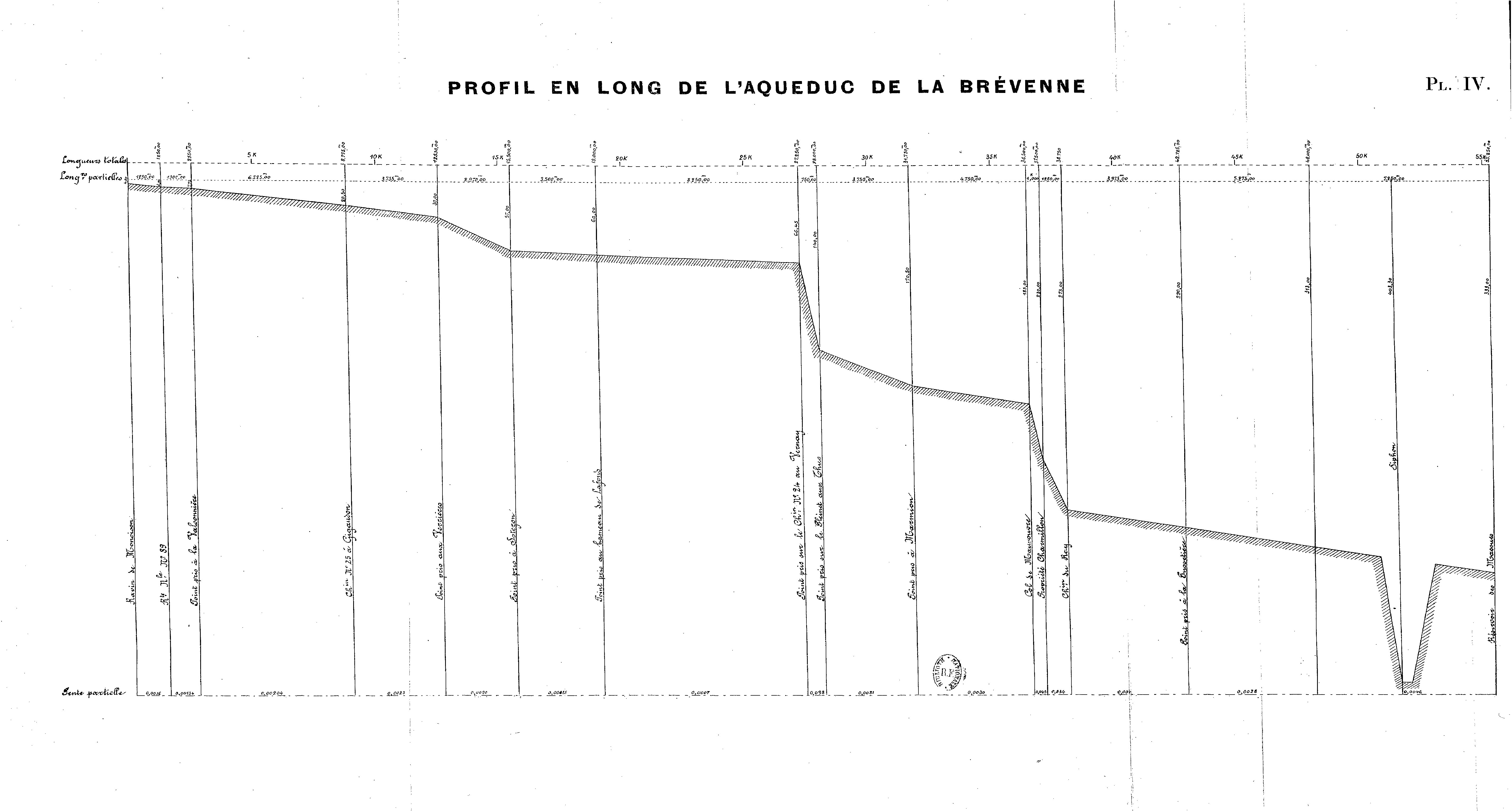 Les aqueducs antiques de Lyon : étude comparée d'archéologie romaine : thèse présentée à la Faculté des lettres de l'Université de Paris / par C. Germain de Montauzan.